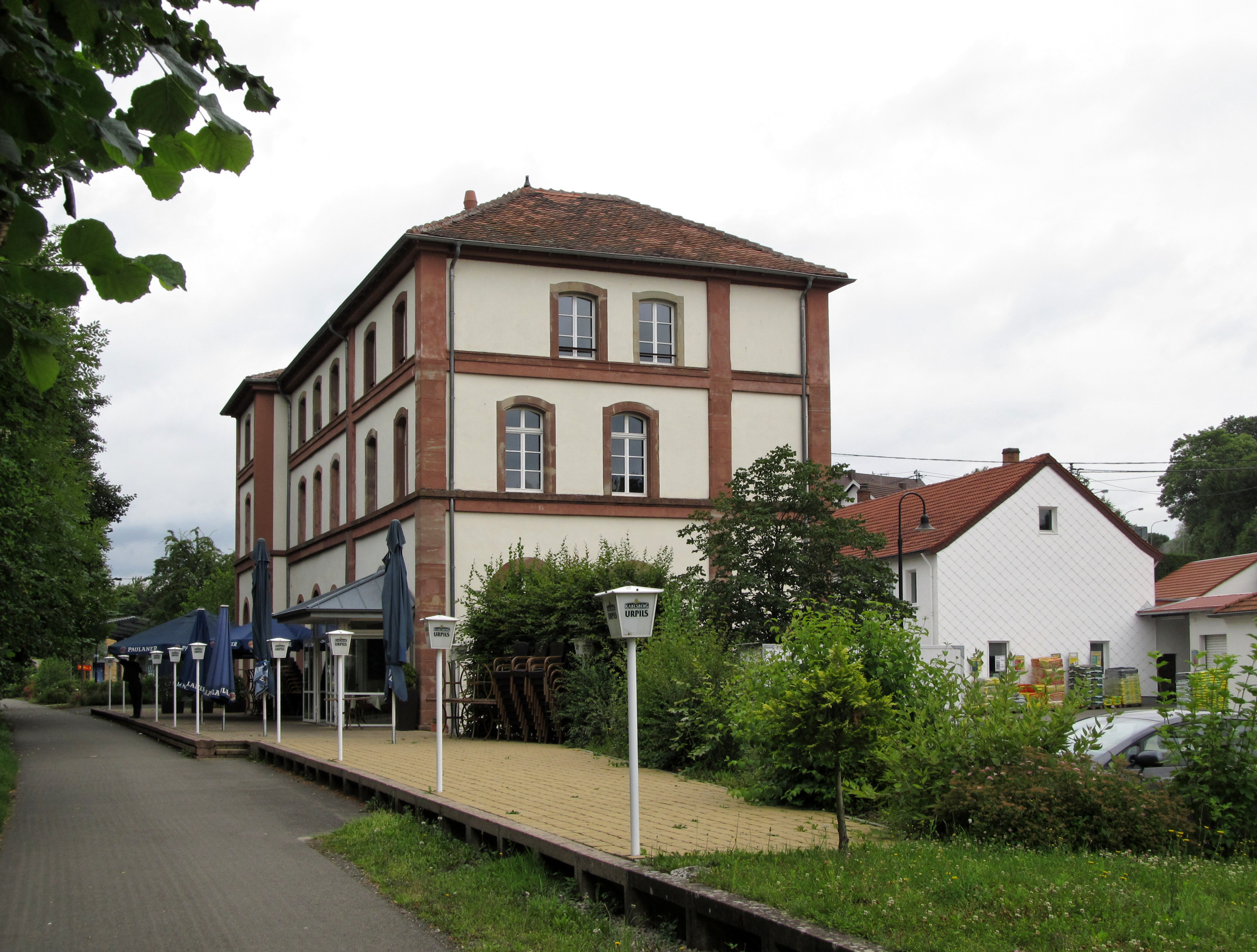 Der ehemalige Bahnhof von Gersheim, Saarland